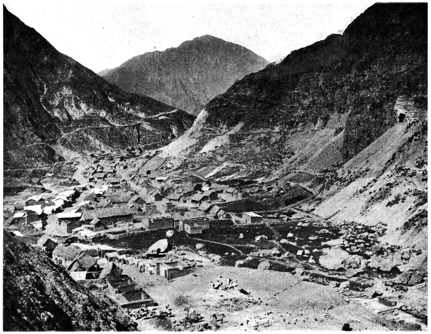 village industriel dans les andes péruviennes, Chicla sur la ligne d’Oroya à 3725 mètres d’altitude.